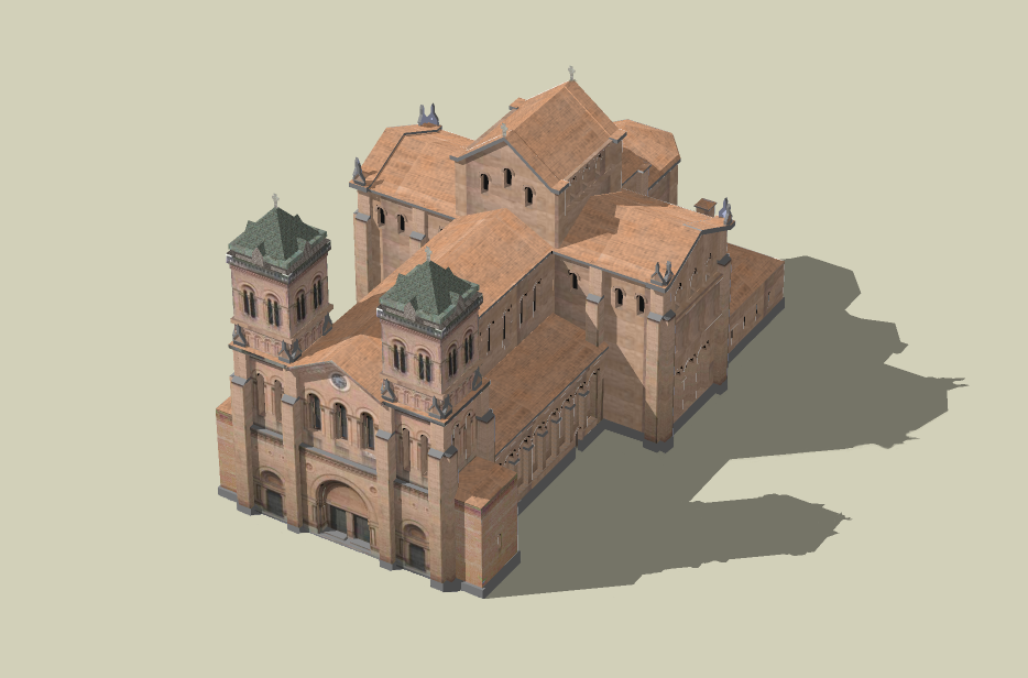 Imagen de modelo en 3D - Goggle Sketchup - de la Catedral Basilica Metropolitana de Medellin